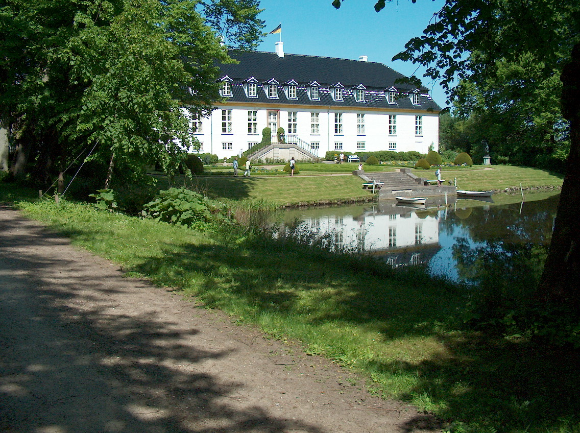 Glorup